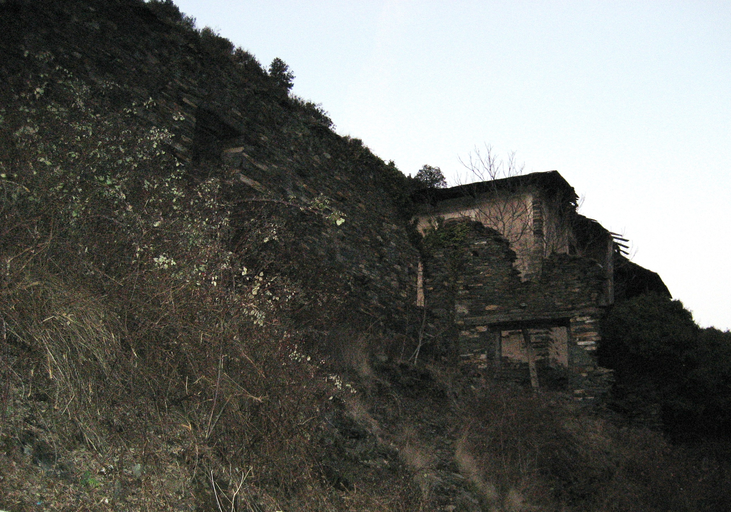 Ferrería de Linares. Antigua herrería del Monasterio de San Pedro de Montes situada en el margen de la actual carretera de Ponferrada a San Pedro de Montes de Valdueza